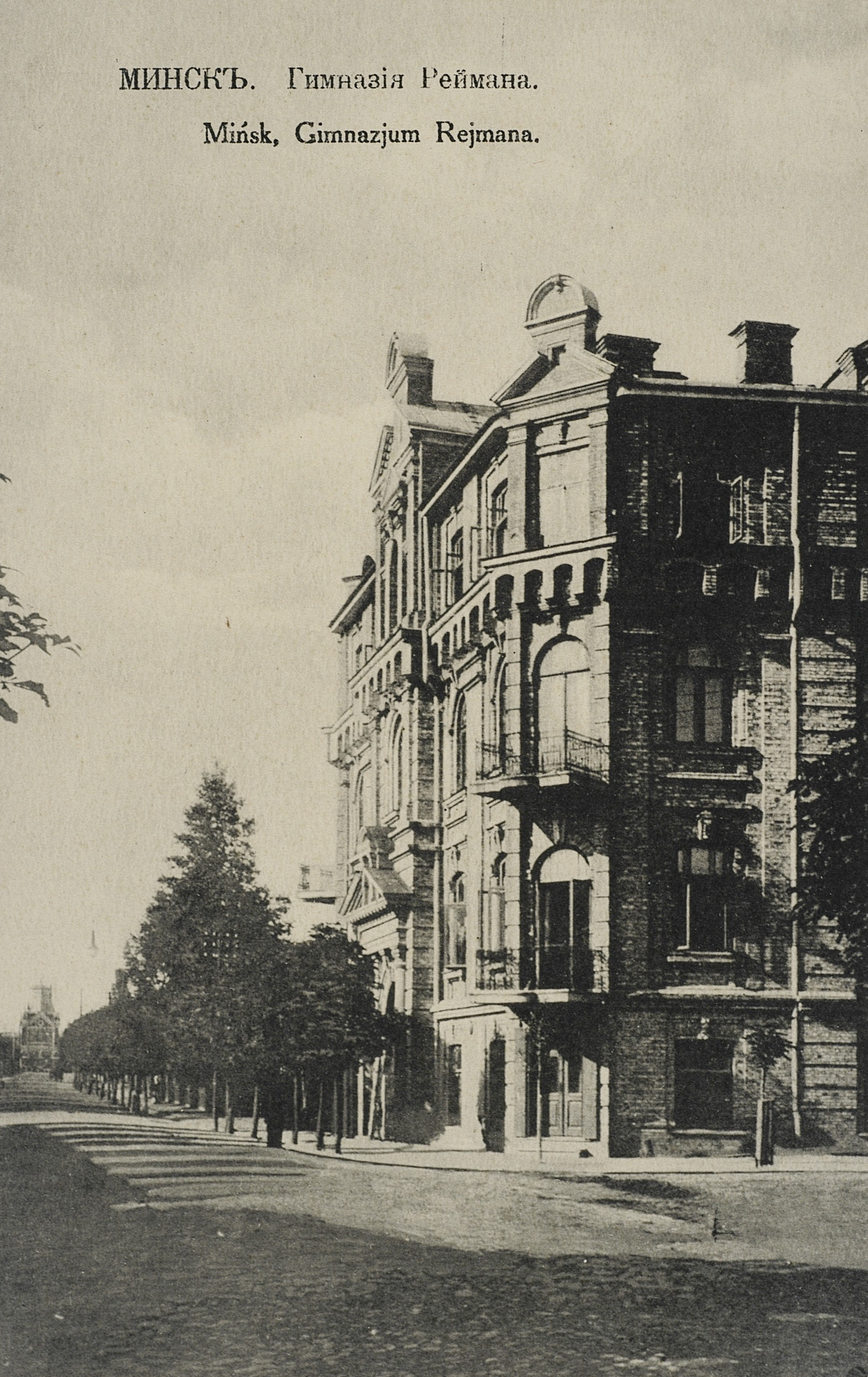 Беларуская (тарашкевіца): Гімназія Рэйман у Менску. Пецярбурскі завулак, 8 — рог Пецярбурскага завулку і Міхайлаўскай вуліцы.